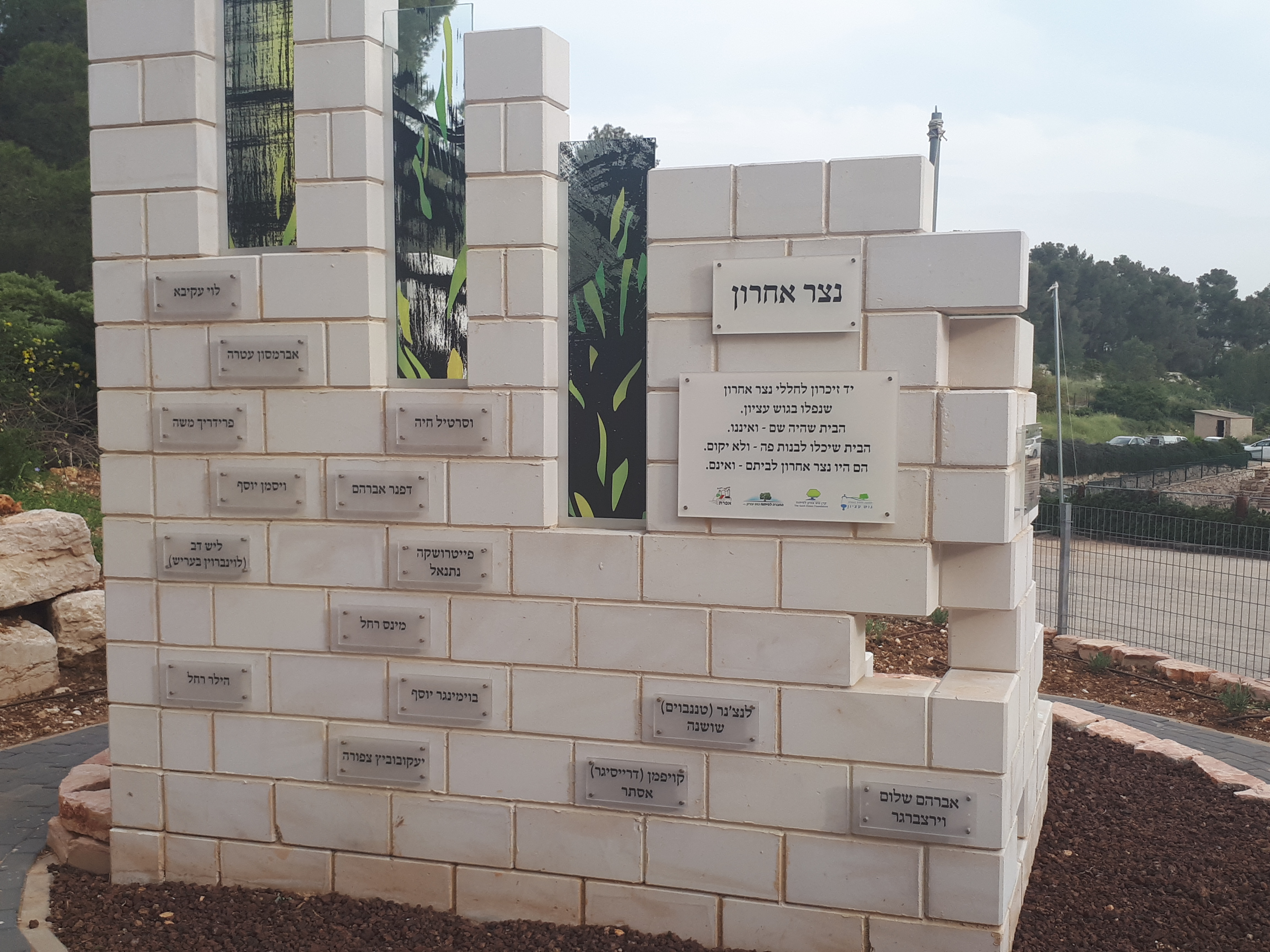 קיר נצר אחרון באנדרטת השואה בבית העלמין האזורי של גוש עציון